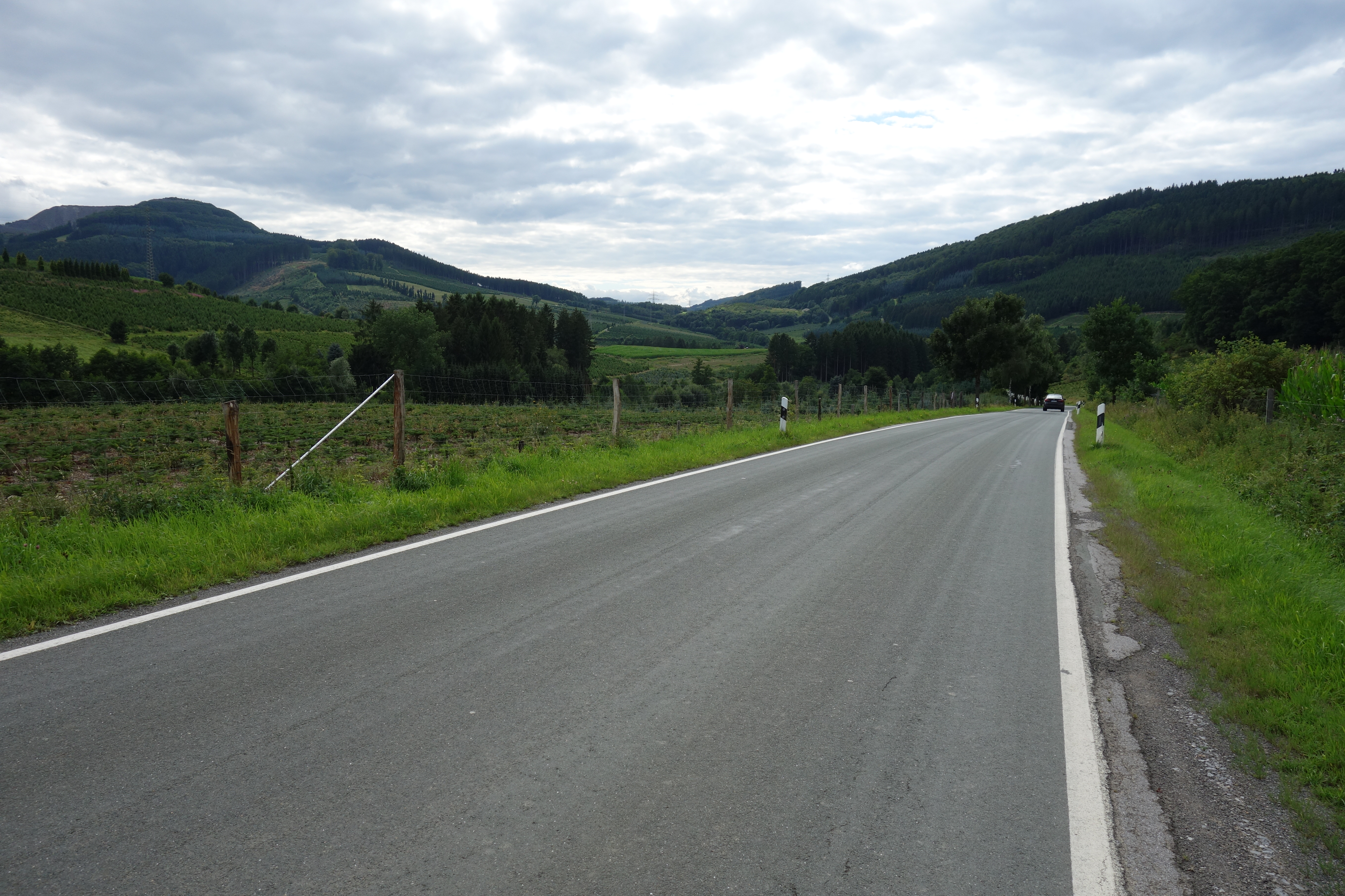 Landschaftsschutzgebiet Bestwig von Straße Herringhausen nach Gevelinghausen aufgenommen.